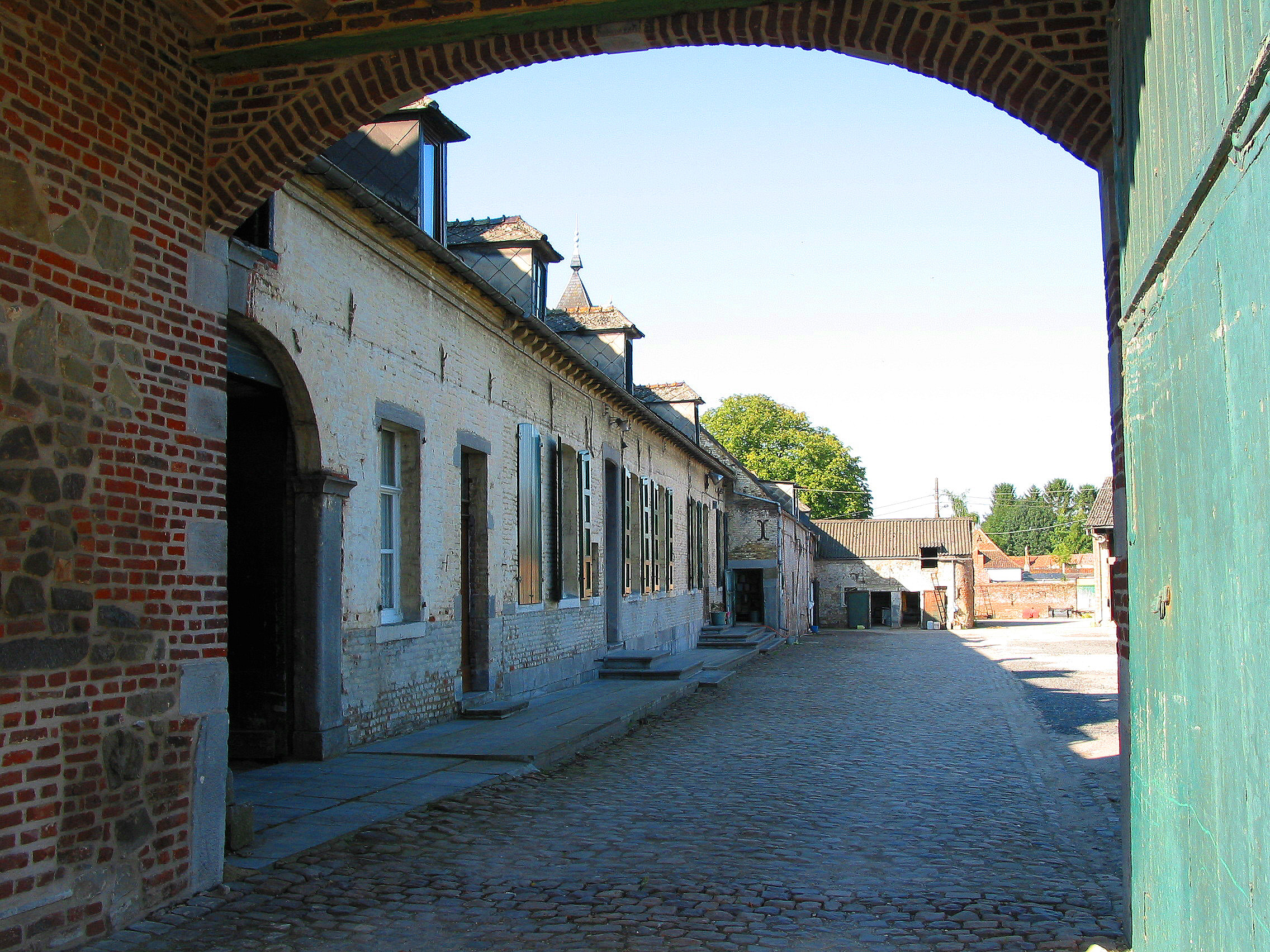 Harmignies Belgique, porche et corps de logis d'une ferme (XIXe siècle). Walon: Armégnî (Bèljike), pwatche èt cwârps di logis d'one cinse (XIXin.me sièke).